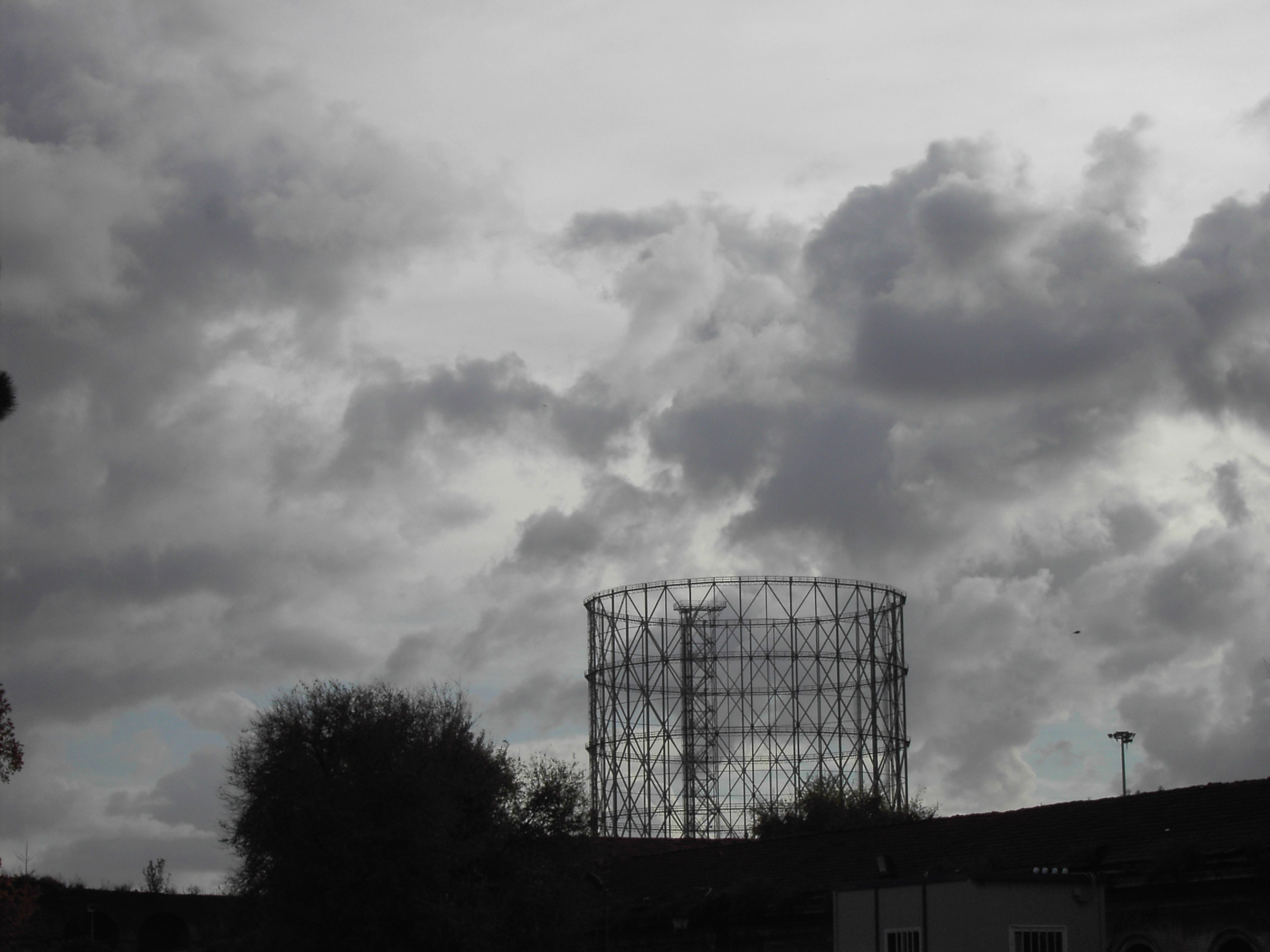 Roma, via Ostiense: il Gazometro visto dal monte dei cocci by Lalupa